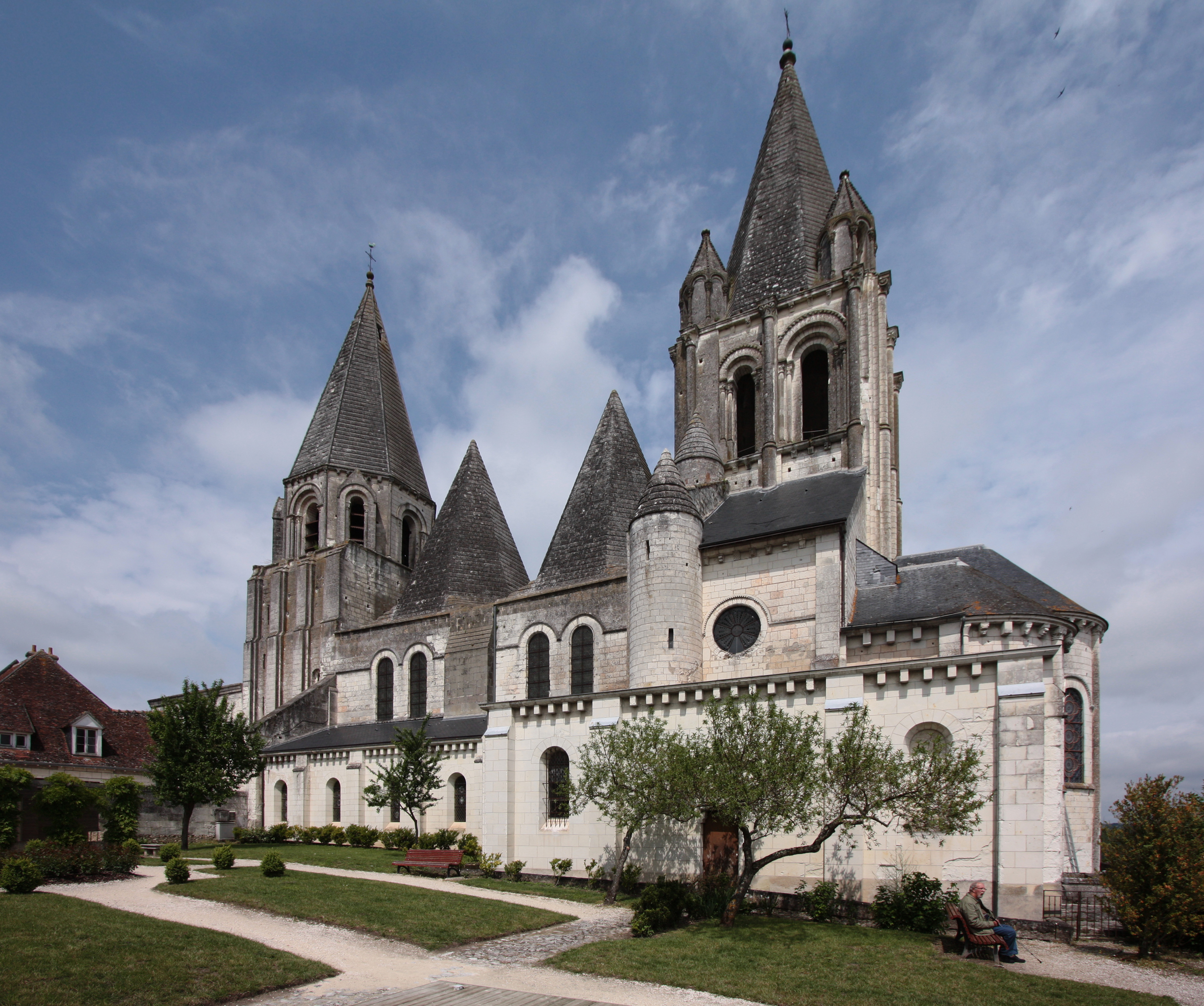 Stadt Loches/Frankreich - Stiftskirche Saint-Ours